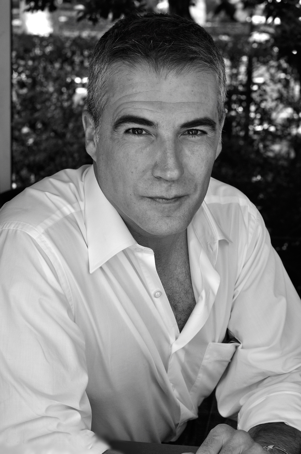 Rostro de David Cantero, periodista y comunicador español.